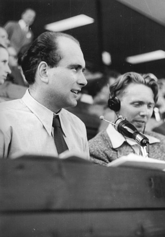 Zentralbild Klein 7.8.1952 Fotos von den XV. Olympischen Spielen in Helsinki. UBz: Der Rundfunkkommentator Oertel der Deutschen Demokratischen Republik teilt die Ergebnisse der Olympiade den Hörern in der DDR mit.